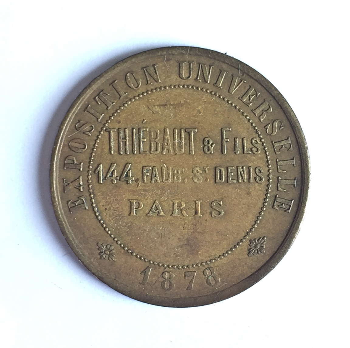 Médaille fabriquée par la "Fonderie Thiébaut & Fils" à l'occasion de l'Exposition Universelle de 1878.